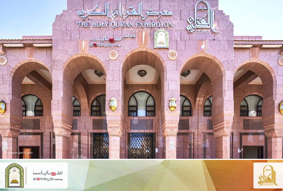 مدخل معرض القرآن الكريم